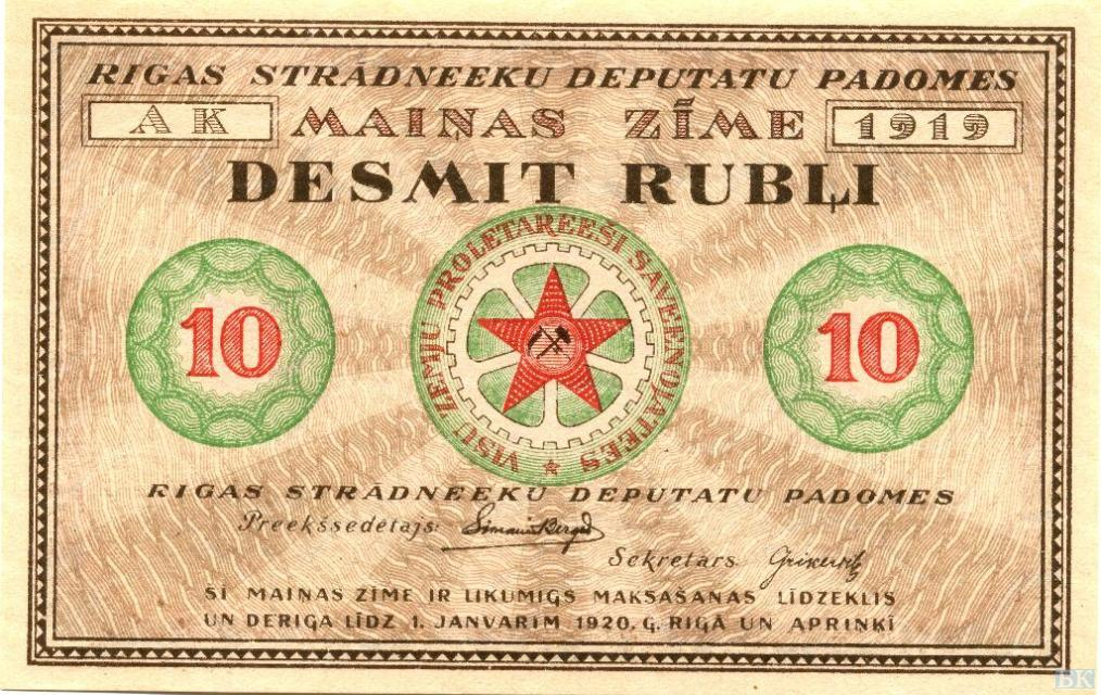 10 рублей ЛатССР 1919 аверс